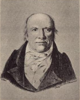 Professor Jens Esmark.